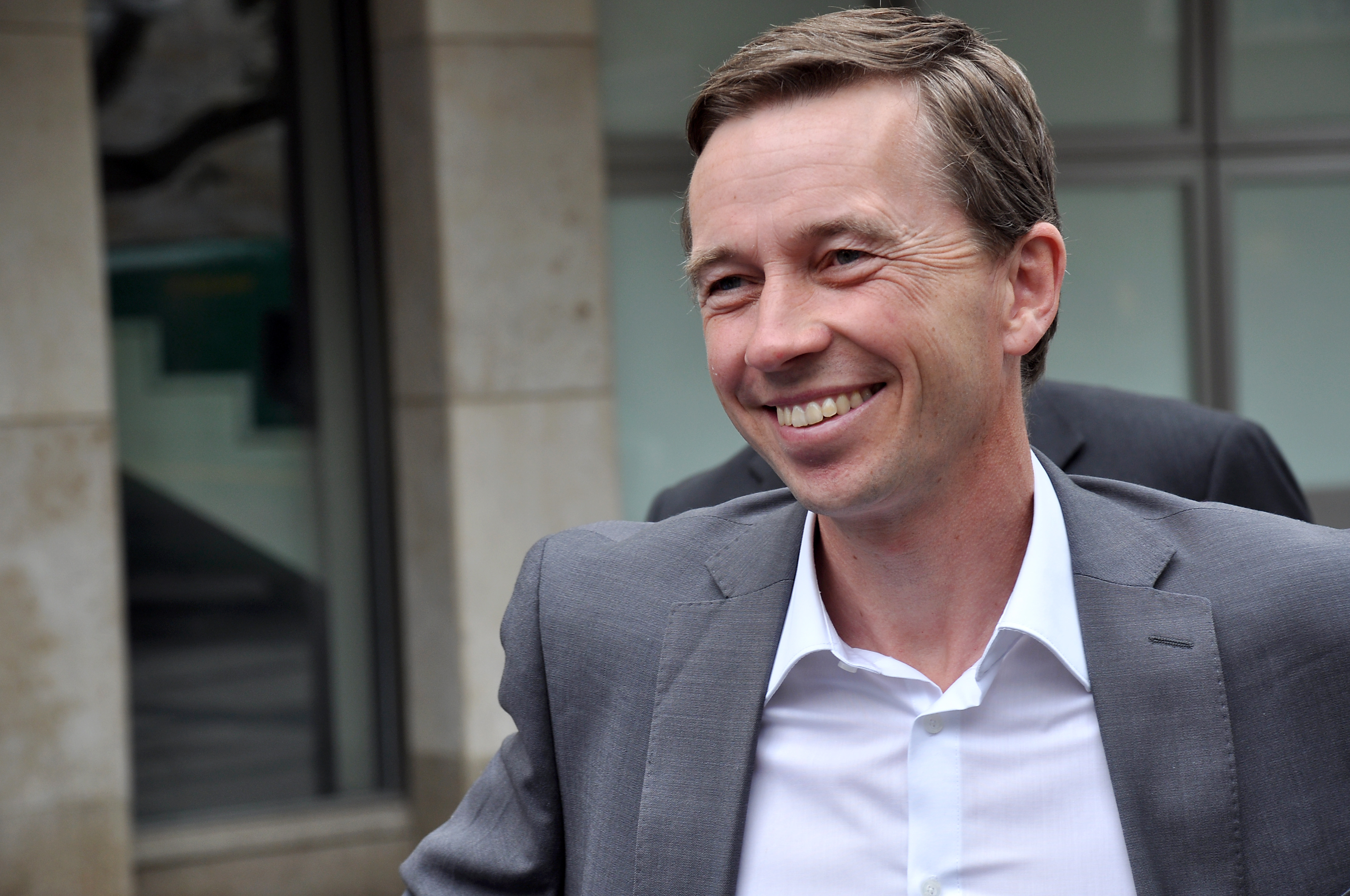 Prof. Bernd Lucke, Sprecher der Alternative für Deutschland (AfD) bei einer Wahlveranstaltung am 03.09.2013 in Dortmund.